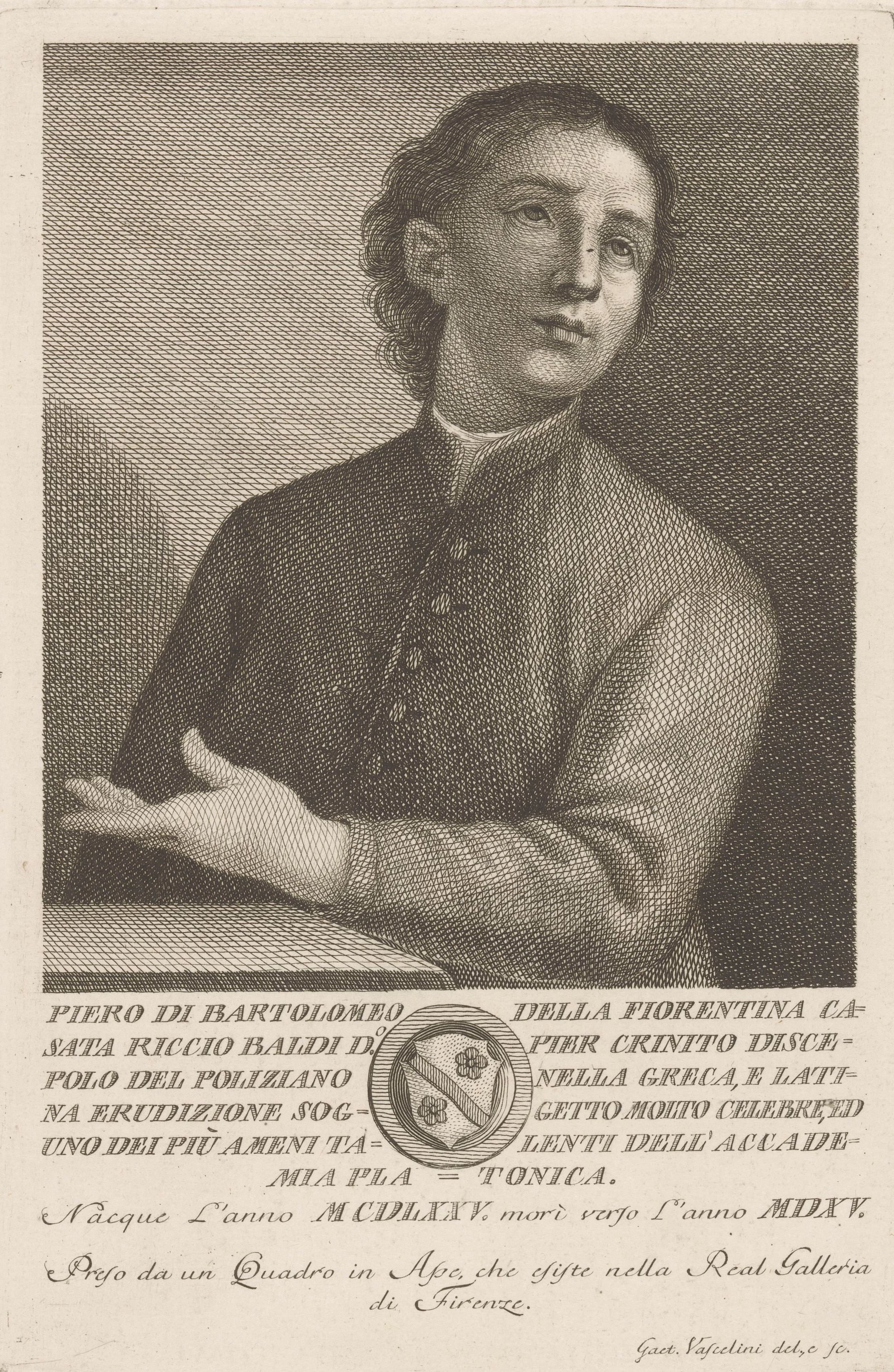 IdentificatieTitel(s): Portret van humanist Pietro del Riccio BaldiObjecttype: prent Objectnummer: RP-P-1909-5440Opschriften / Merken: verzamelaarsmerk, verso, gestempeld: Lugt 2228Omschrijving: Onder het portret een tekst in het Italiaans en een wapenschild in een cirkelvormig kader.VervaardigingVervaardiger: prentmaker: Gaetano Vascellini (vermeld op object)naar eigen ontwerp van: Gaetano Vascellini (vermeld op object)naar schilderij van: onbekend (vermeld op object)Plaats vervaardiging: ItaliëDatering: 1755 - 1805Fysieke kenmerken: ets en gravureMateriaal: papier Techniek: graveren (drukprocedé) / etsenAfmetingen: plaatrand: h 304 mm × b 203 mmOnderwerpWat: historical personsWie: Pietro del Riccio BaldiVerwerving en rechtenVerwerving: aankoop 1905Copyright: Publiek domein